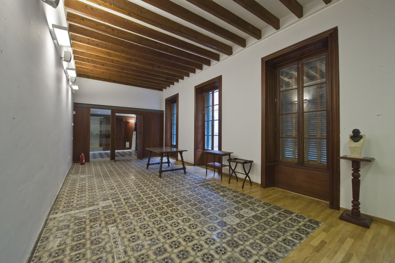 Sala d'actes de la Institució Alcover